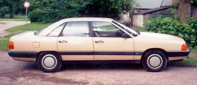 Audi 100 Typ 44, Baujahr 1987